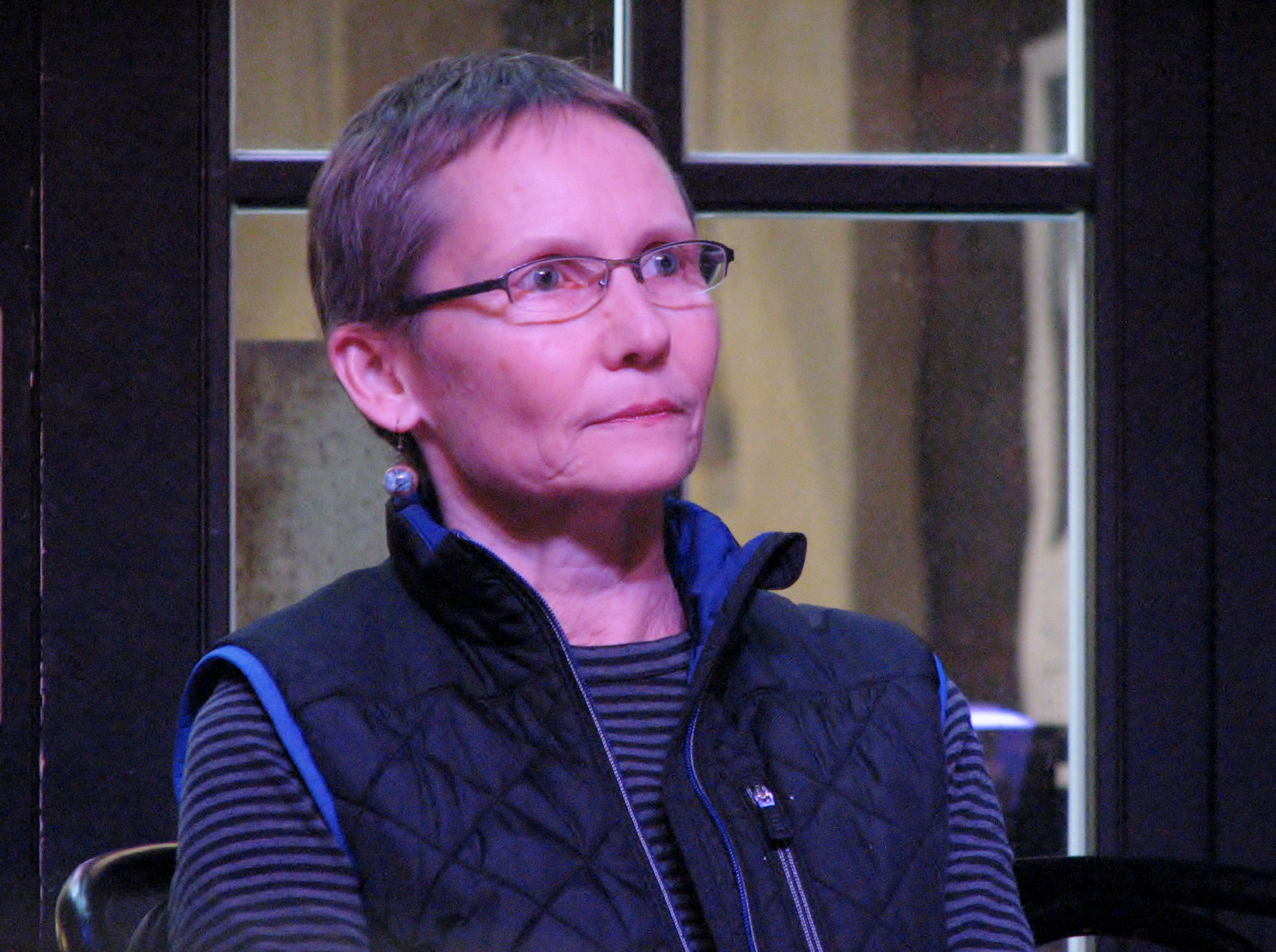 Marika Blossfeldt enne loengu "Lae keha ja meel värske energiaga arukalt toite valides" andmist Von Krahli akadeemias